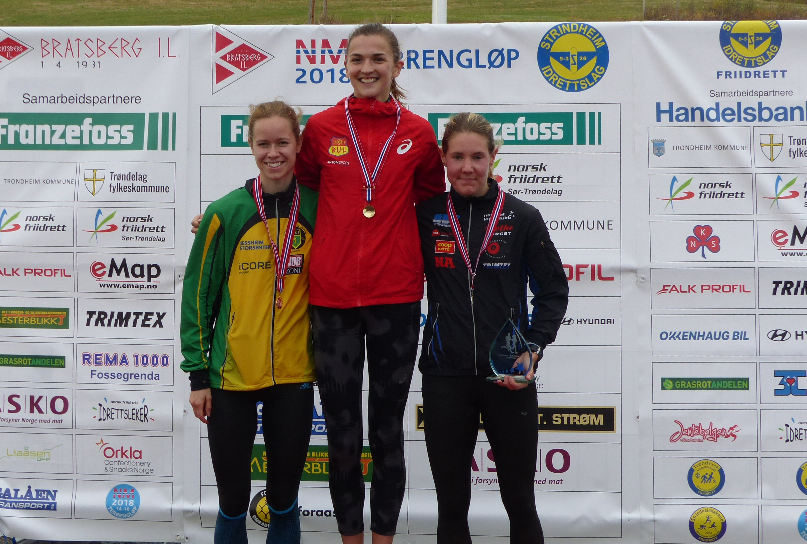 NM i terrengløp, lang løype, Bratsberg - Trondheim, 2018. Seierspallen for kvinner senior.